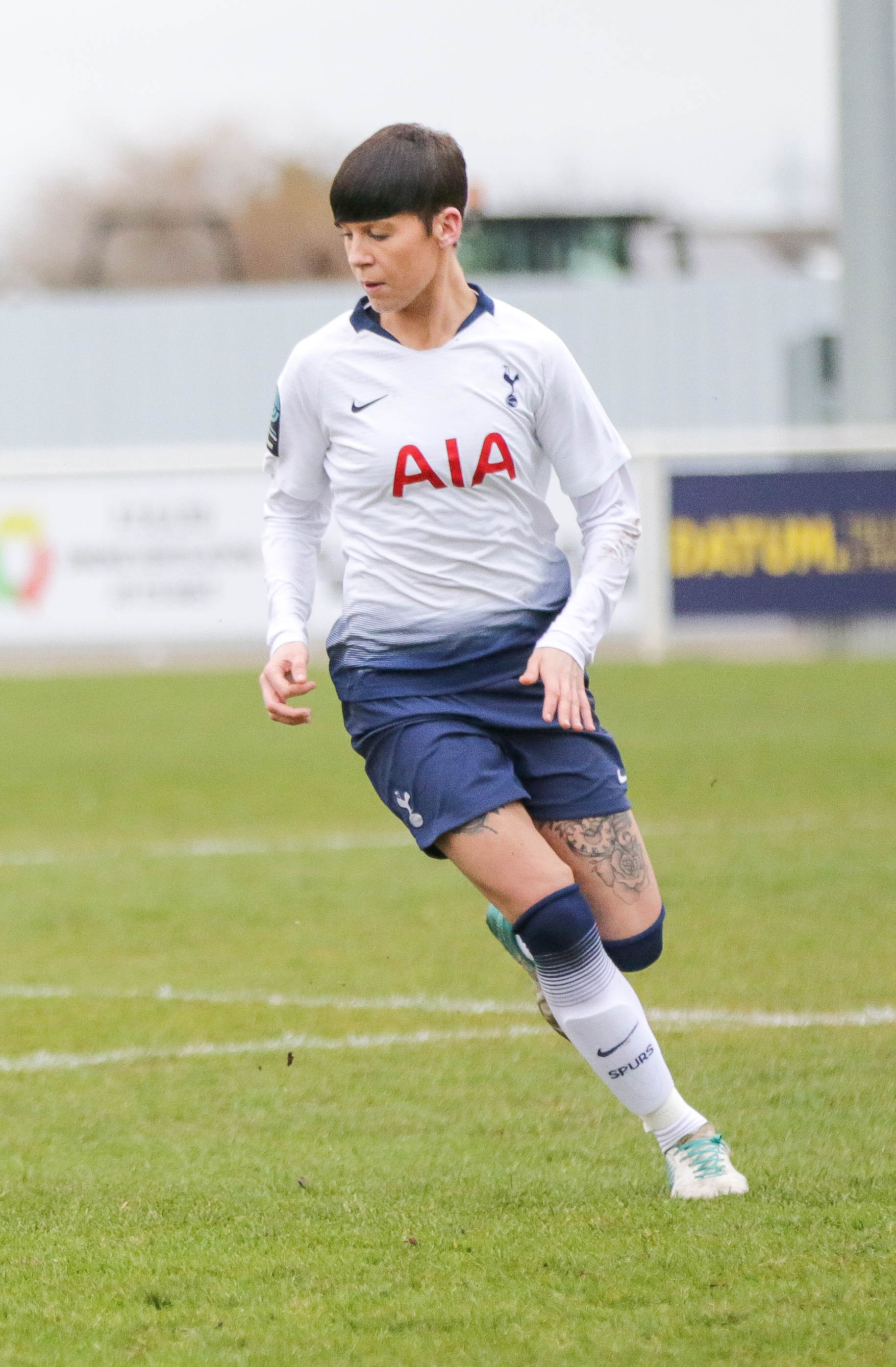 Tottenham Hotspur 3 Lewes 0 13 01 2019-425.jpg